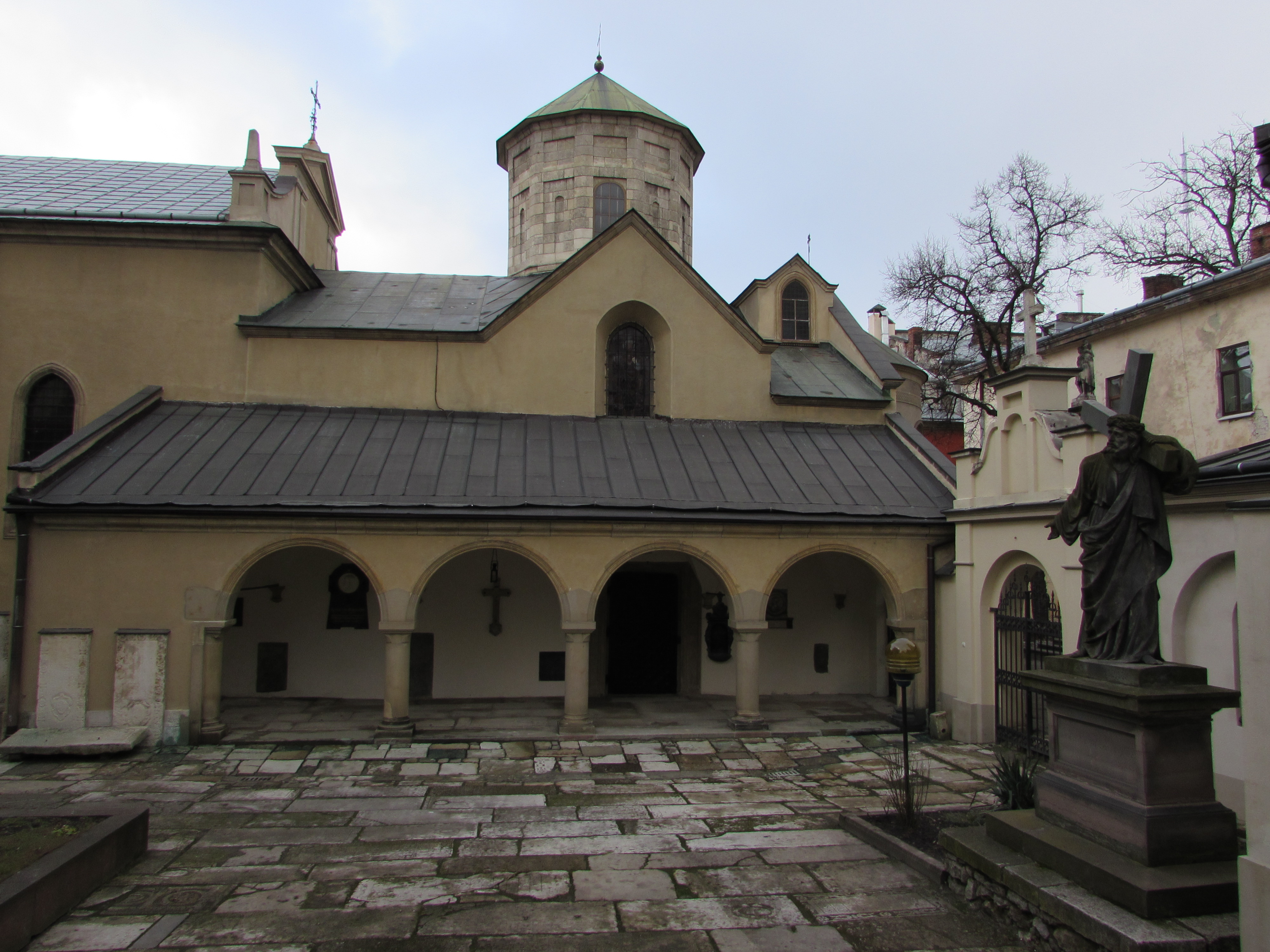 Вірменський собор св. Трійці, Львів, Вірменська, 7